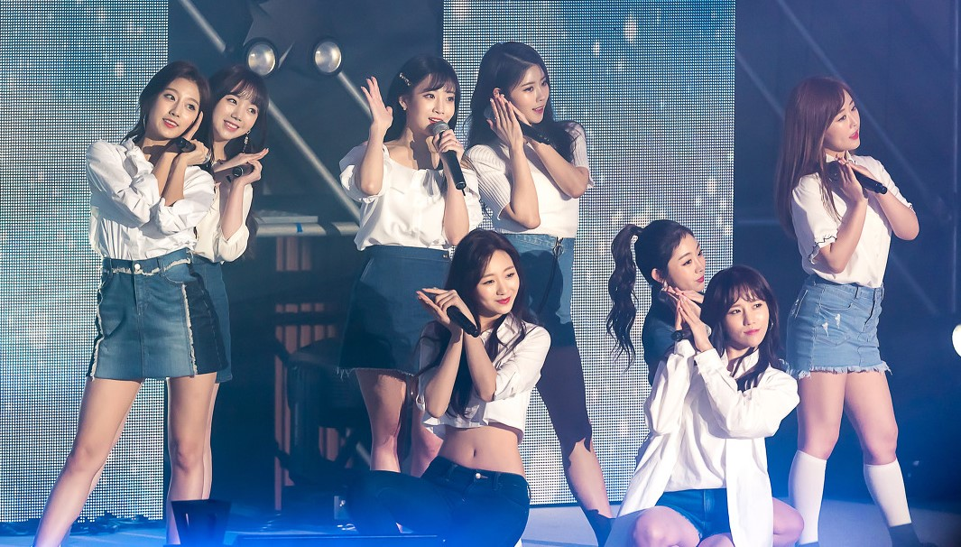 180412 포항시민콘서트 러블리즈